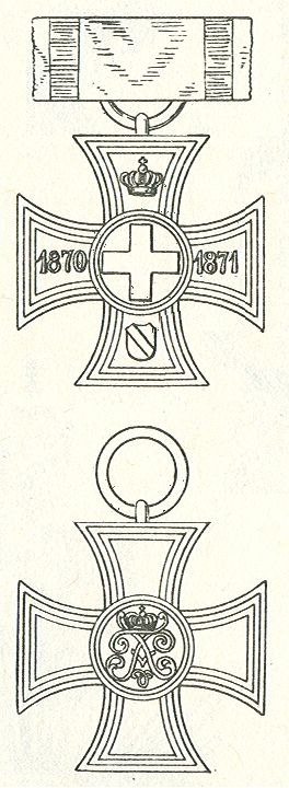 Das Erinnerungskreuz fuer den Feldzug 1870/71. Grossherzogtum Baden